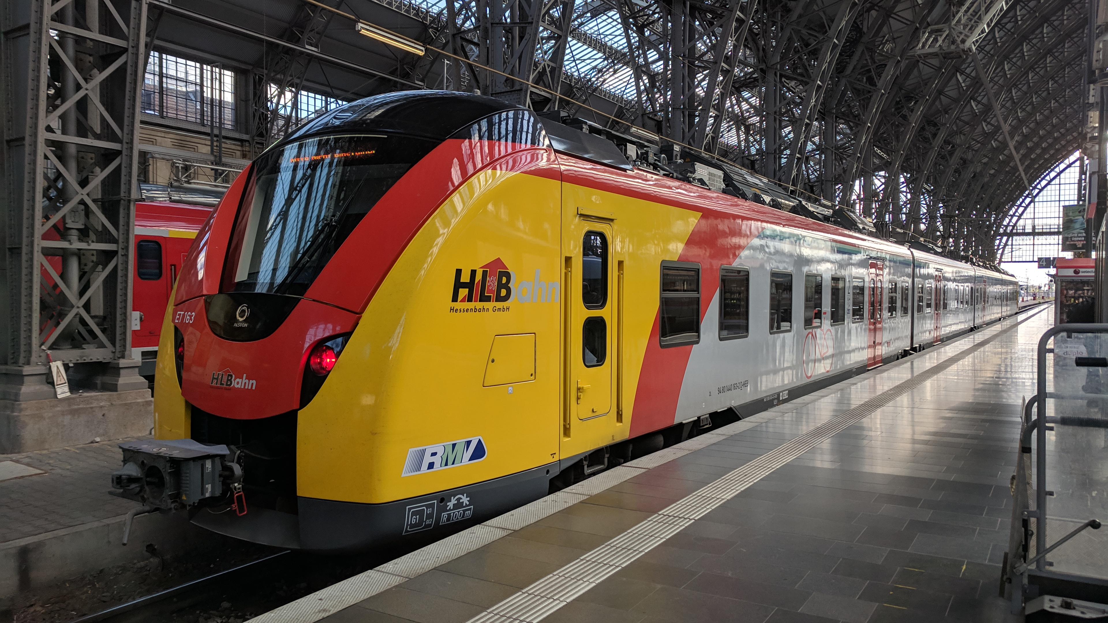 HLB ET163 (94 80 1440 163-2 D-HEB), Bahnhof Frankfurt (Main) Hauptbahnhof, Taken on 12 May 2019